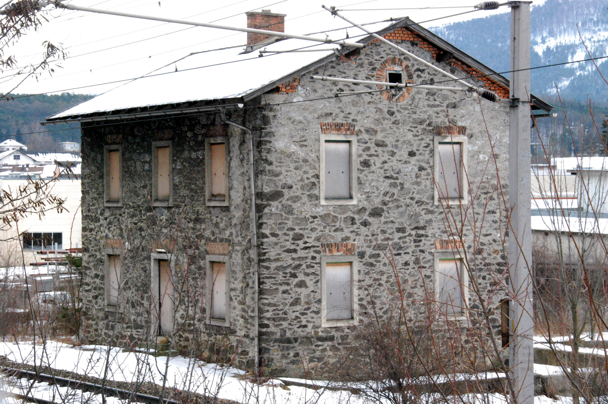 Südbahnstrecke Semmering-Bahn (Gloggnitz-Mürzzuschlag), Wächterhaus 123 der Semmeringbahn in der Oberen Zeilfeldstraße 2 in Gloggnitz